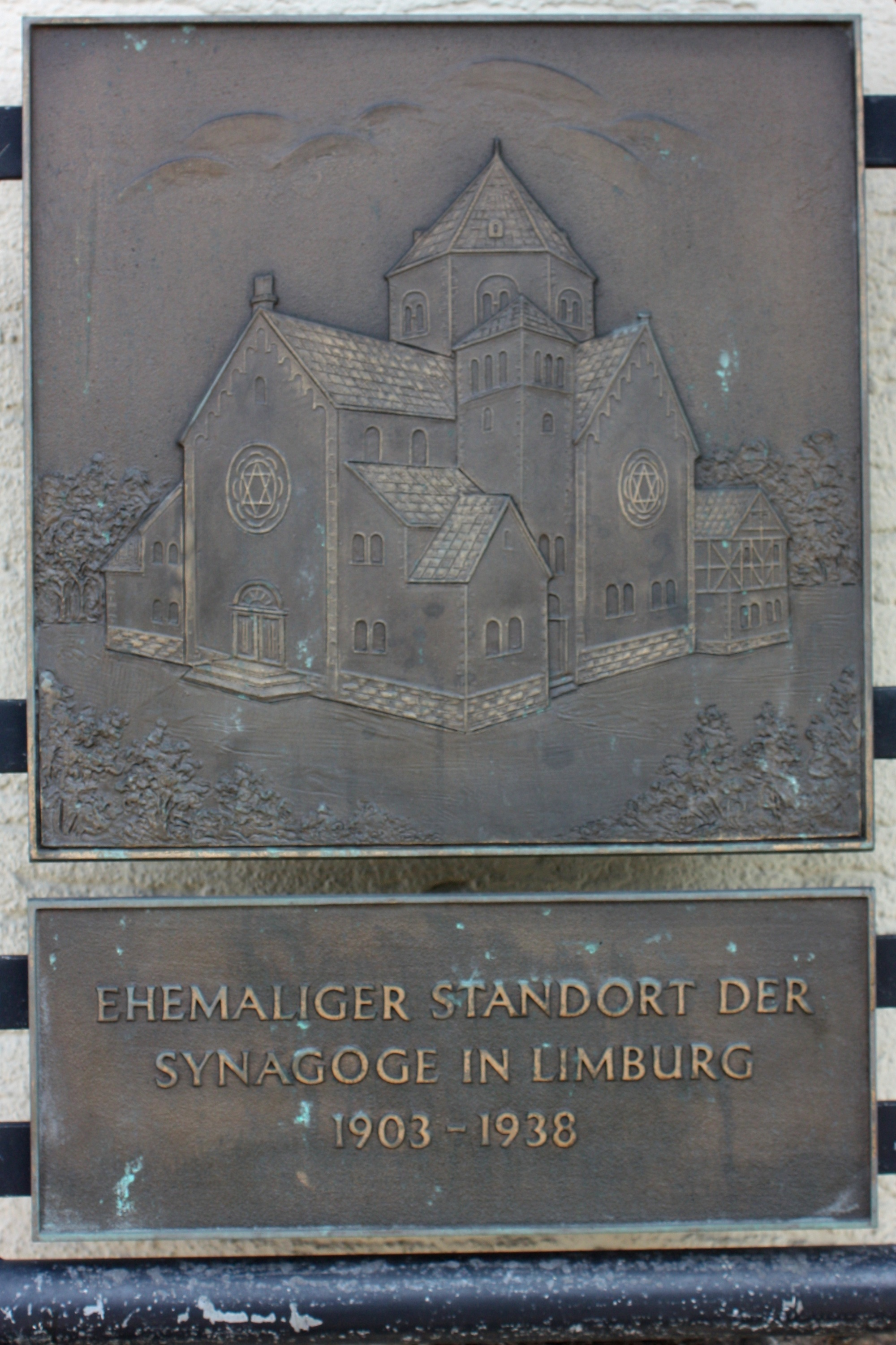 Limburg, Hessen: Gedenktafel für die 1938 zerstörte Synagoge